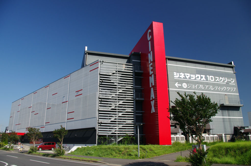 千葉県ja:印西市、千葉ニュータウンにあるシネマックス千葉ニュータウン